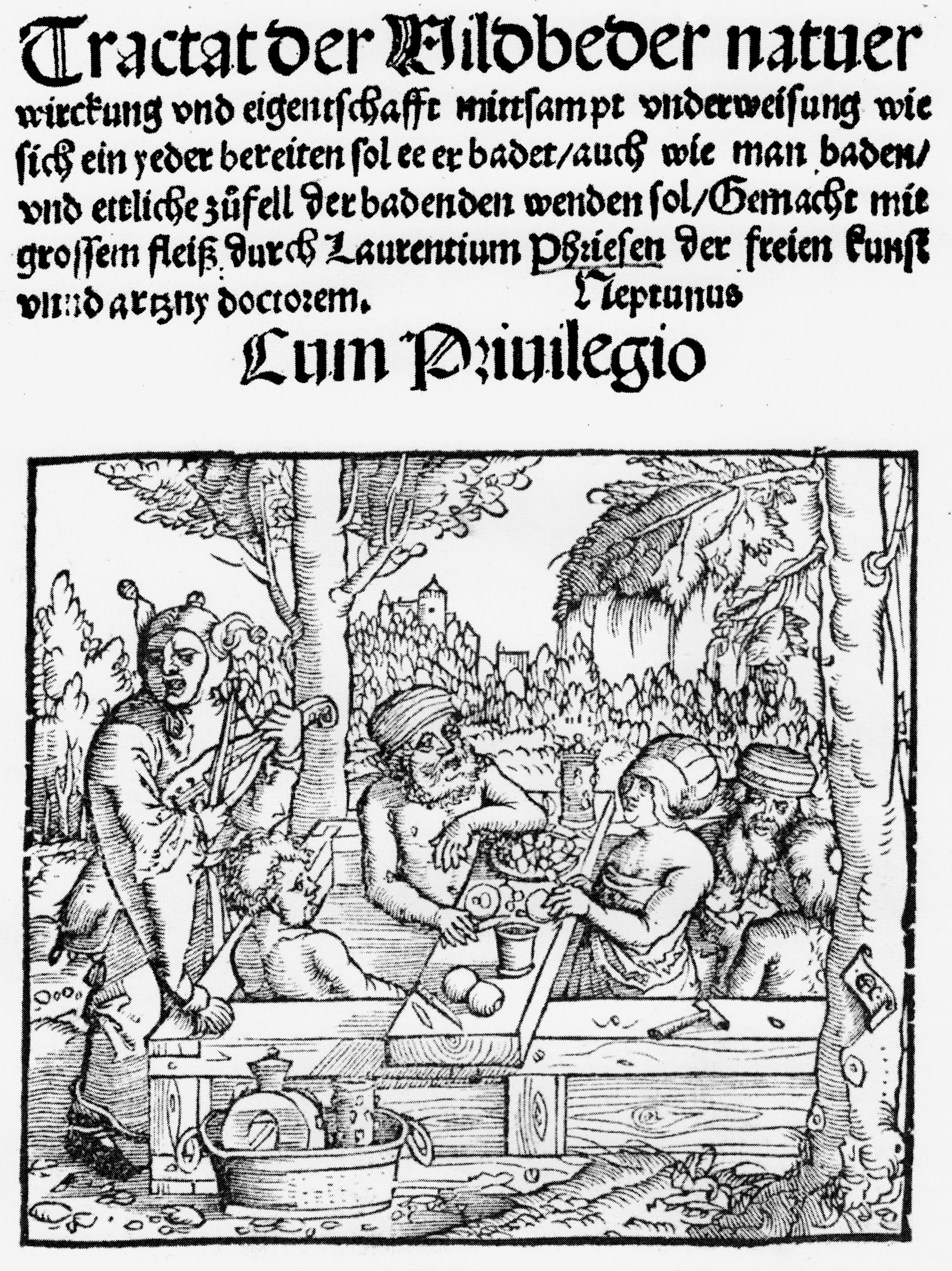 Titelblatt der Schrift: Von der Wildbäder Natur.